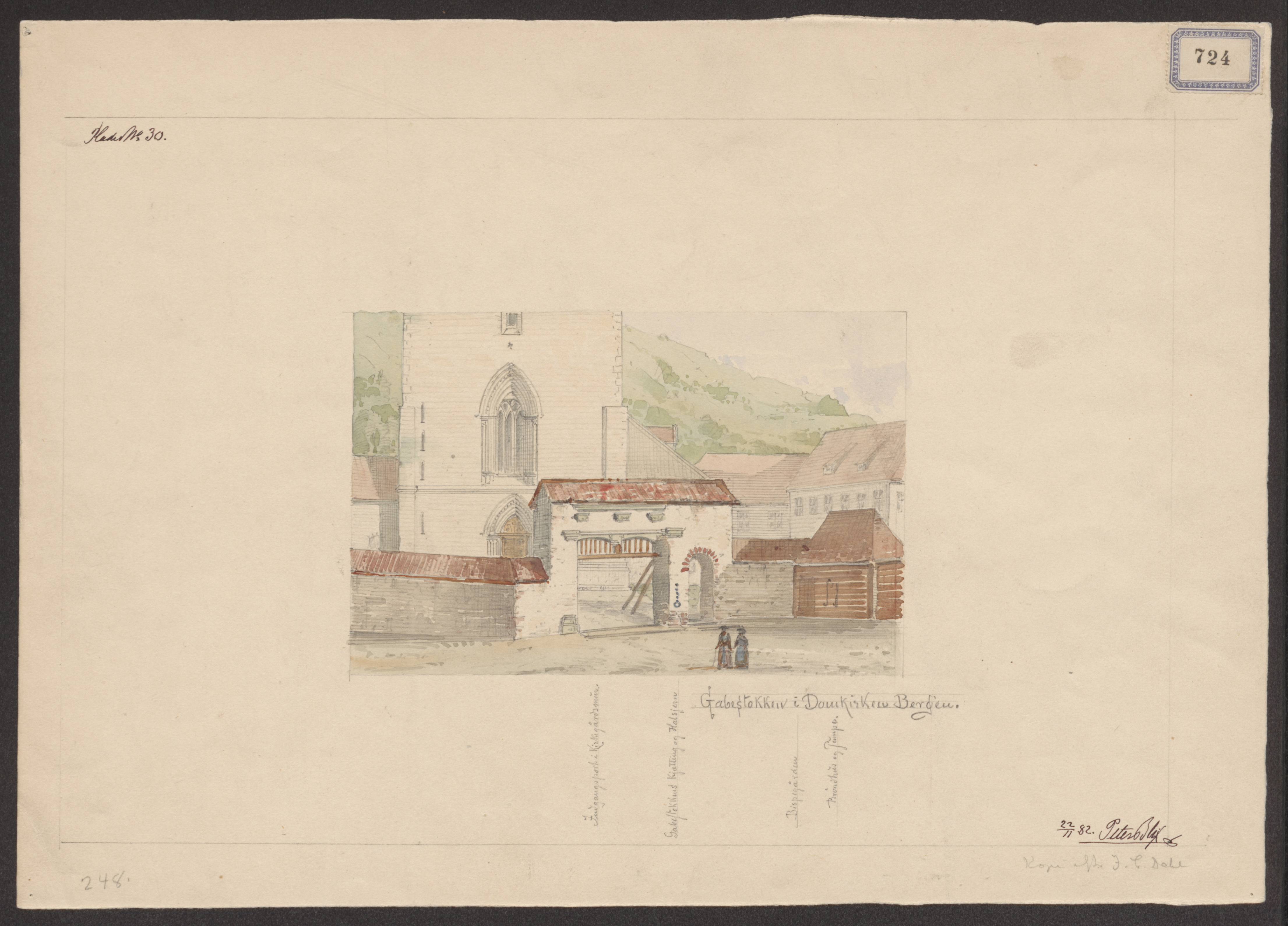 Bildet er hentet fra Riksantikvaren. Kirkens vestside med gapestokken før 1840 (FF kat.nr. 724) Eier : Fortidsminneforeningen Sted : Norway, Hordaland, Bergen Emneord: "REKONSTRUKSJONER, FASADER, GAPESTOKK" Medium : Akvarell